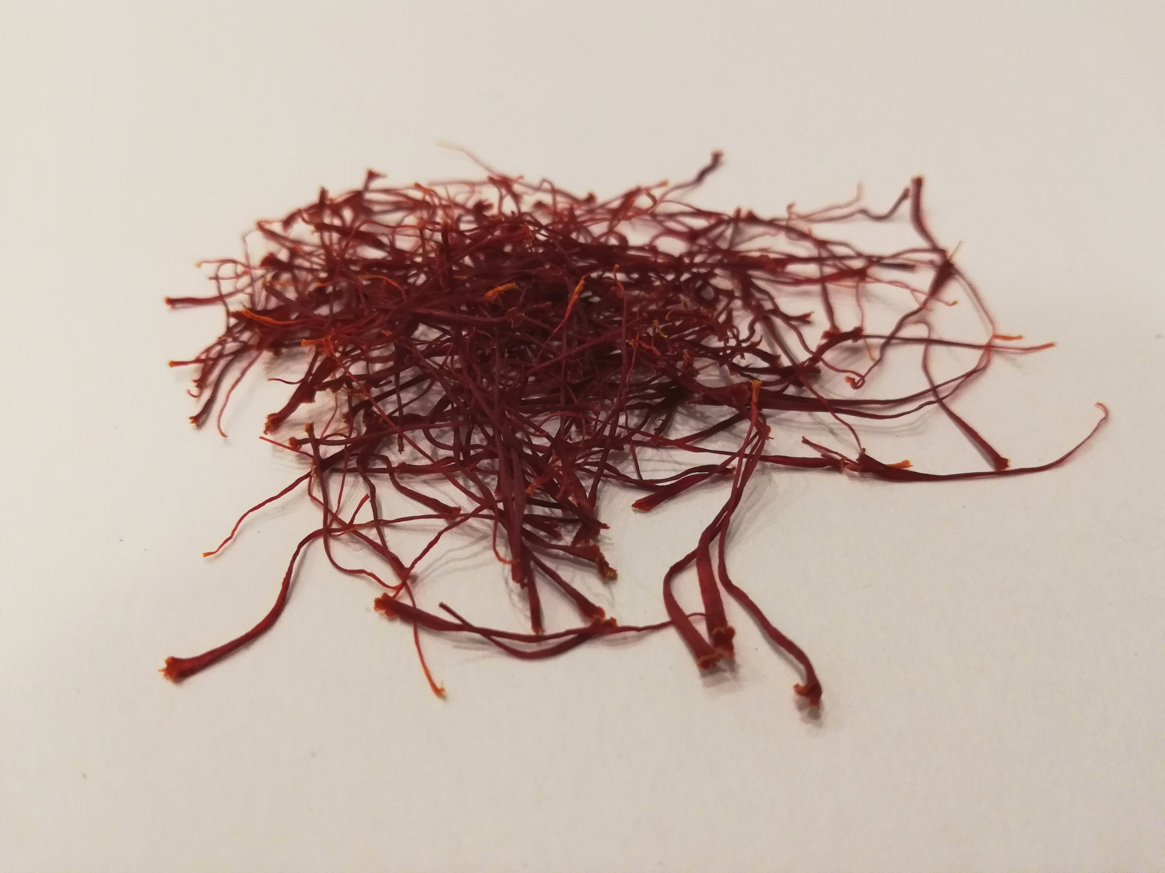 Épice de safran produit dans le nord-ouest de la France.